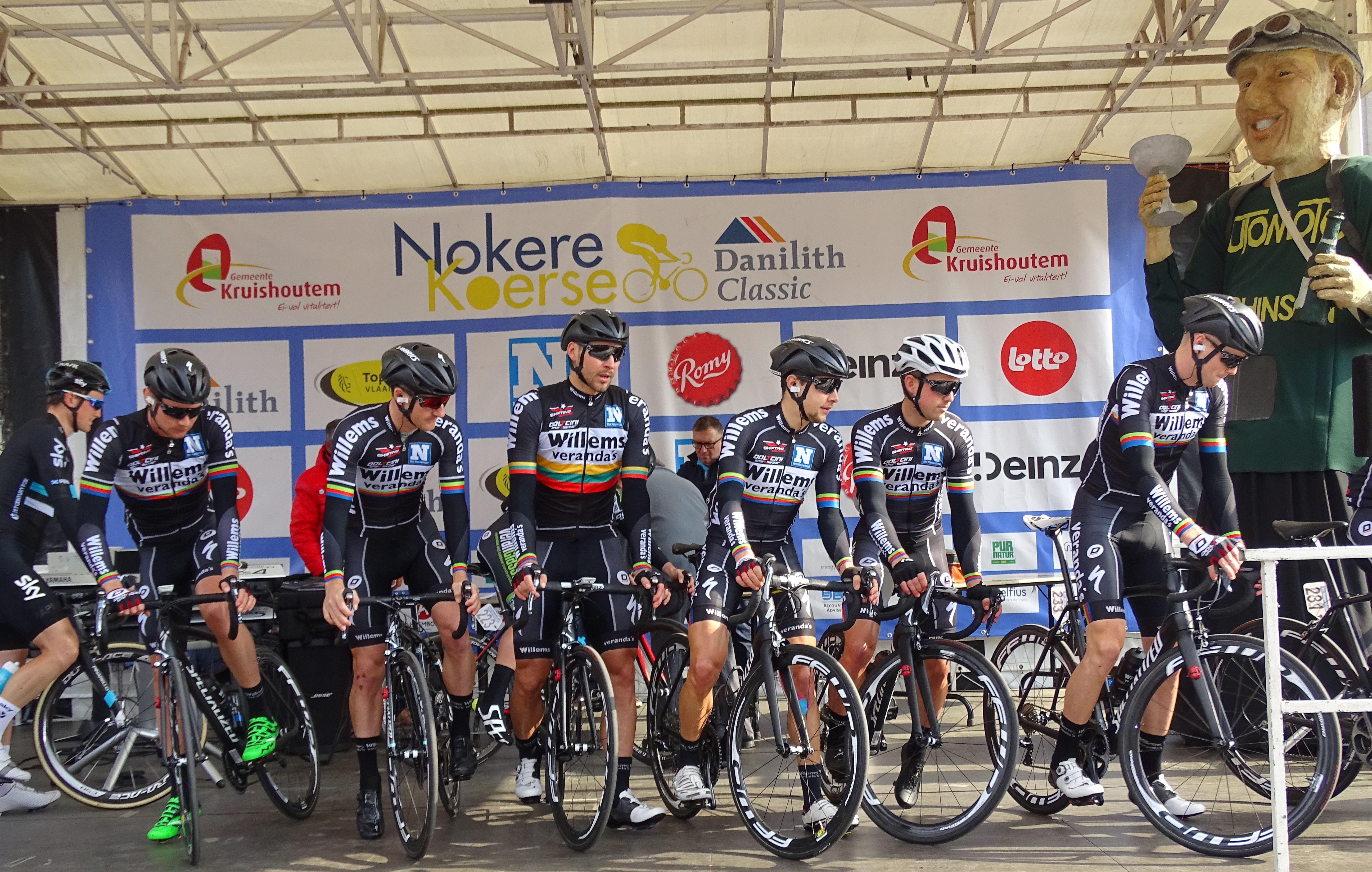 Reportage réalisé le mercredi 16 mars à l'occasion du départ de la Nokere Koerse 2016 à Deinze, Belgique.